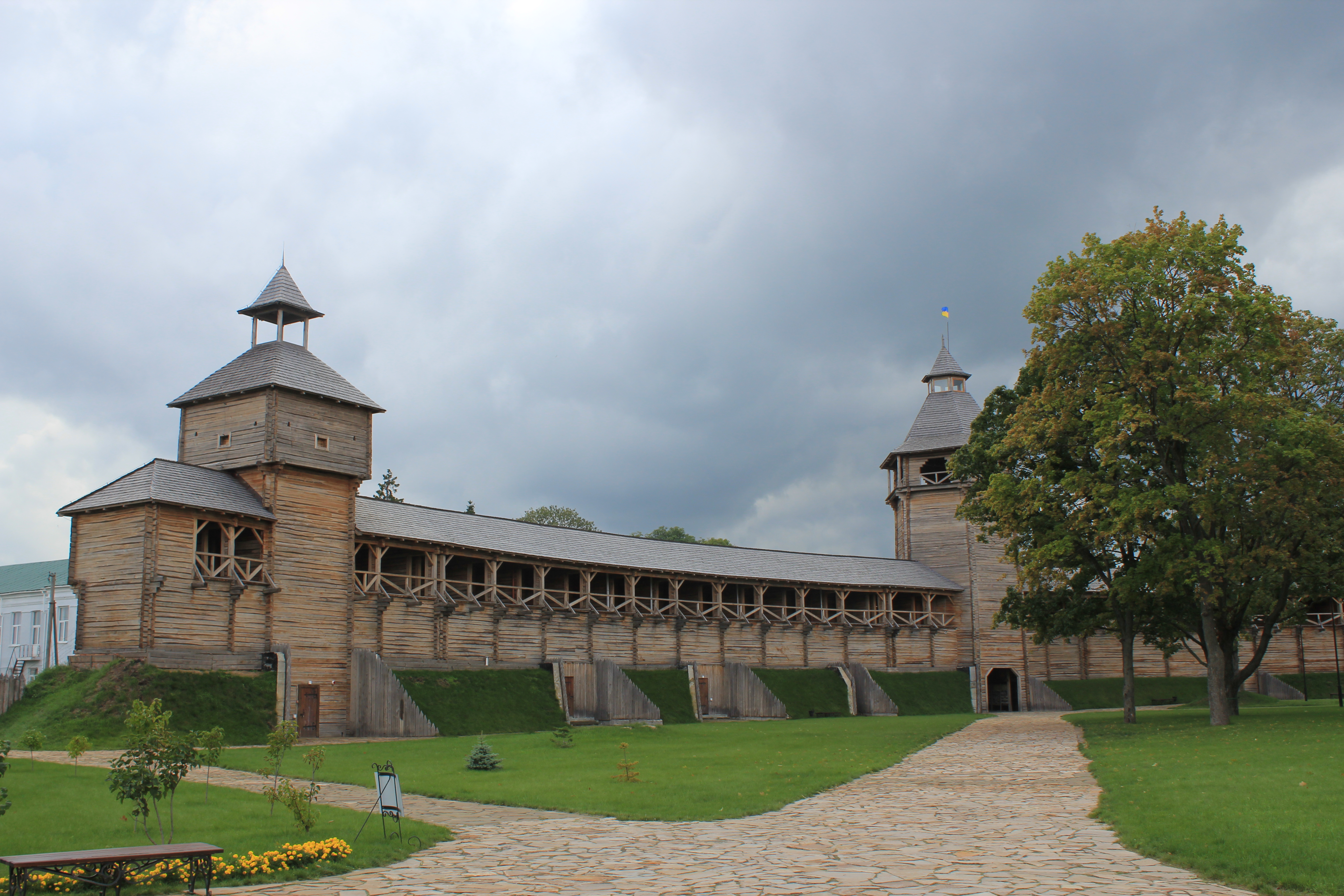 Поселення укріплене багатошарове «Батуринська фортеця», Батурин, між вулицями Партизанська, Петровського, Радянської та провулками Партизанськім і Петровського